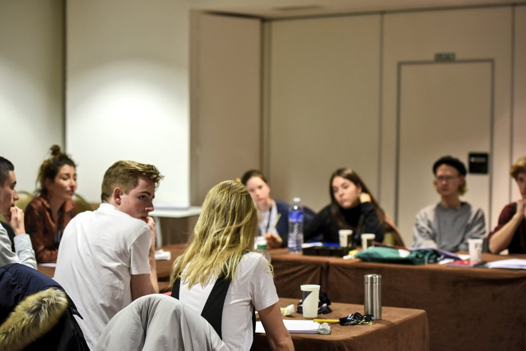 Délibération du Jury au Festival FIPADOC